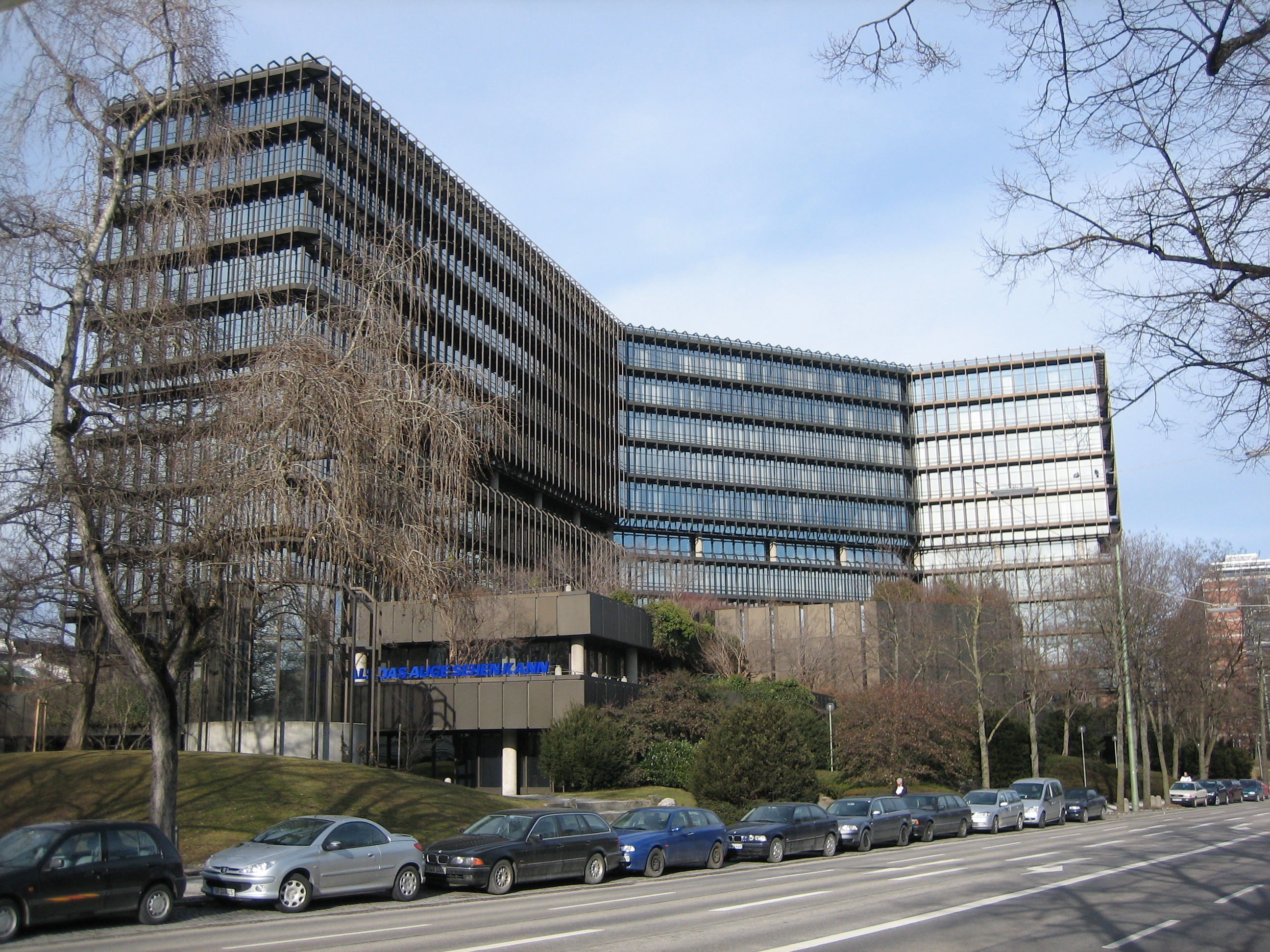 Europäisches Patentamt in München